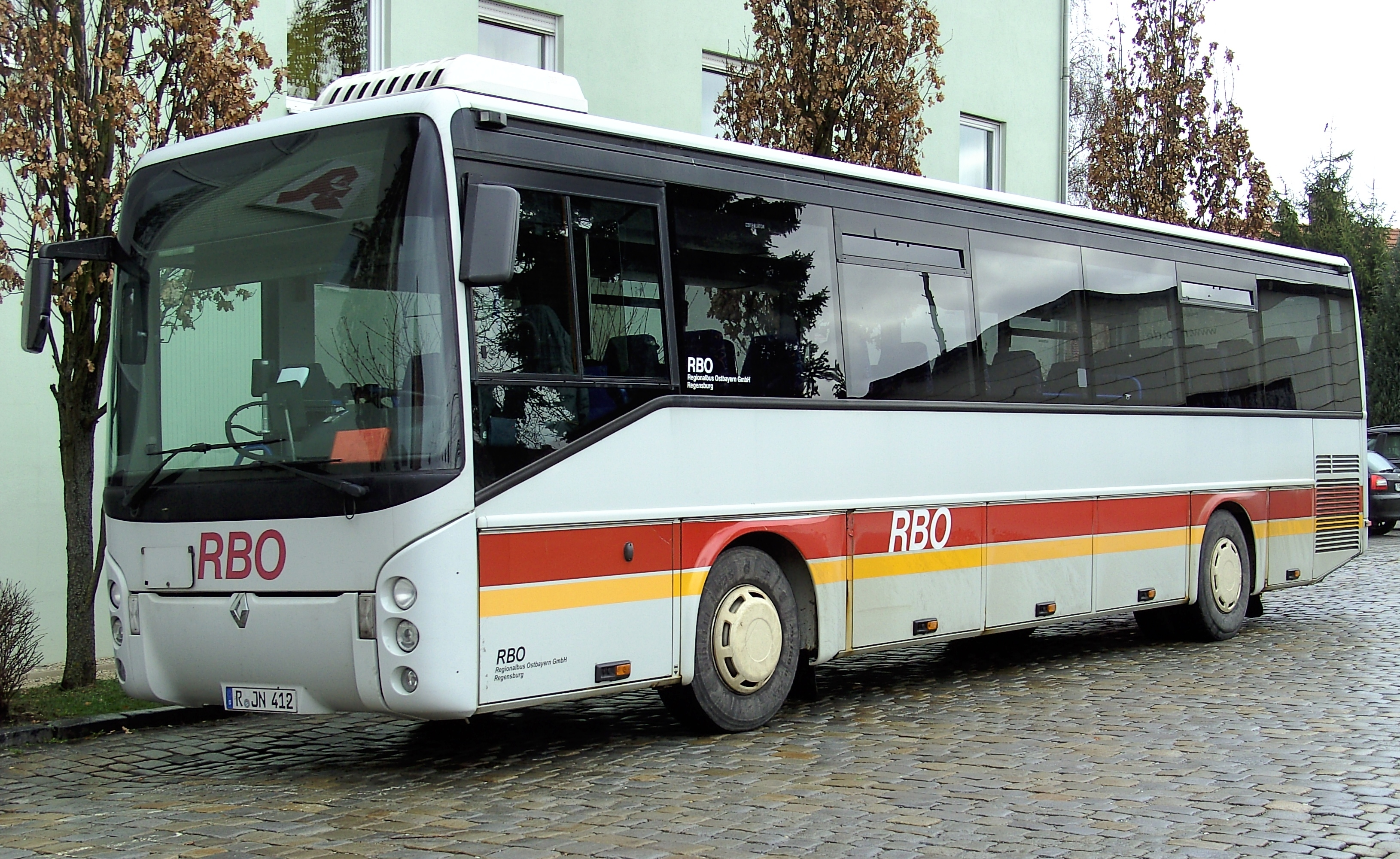 Ein Renault-Bus in Vilshofen an der Donau.